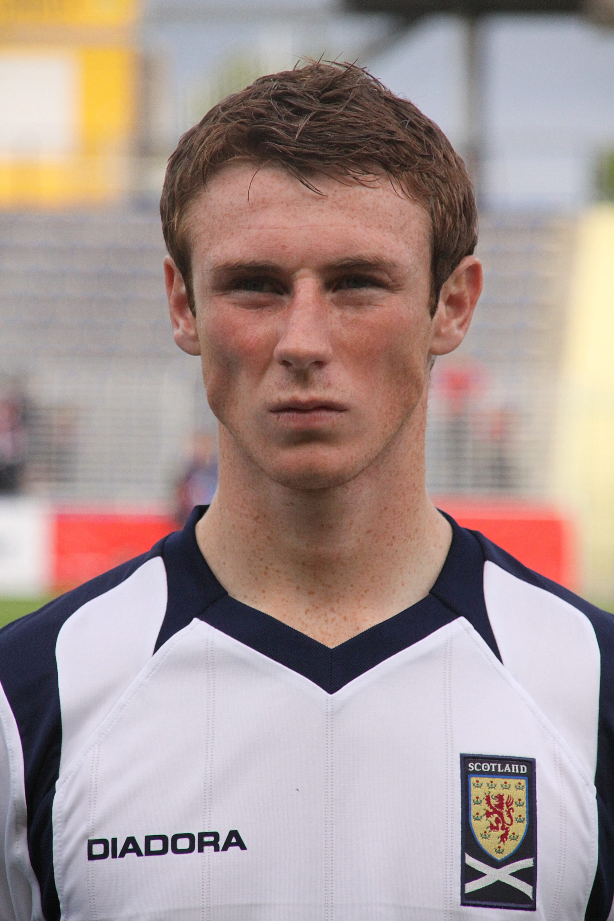 Christopher Mitchell (FC Falkirk) - Schottische Fußballnationalmannschaft (U-21-Männer) Christopher Mitchell (Falkirk F.C.) - Scotland national under-21 football team — (1)